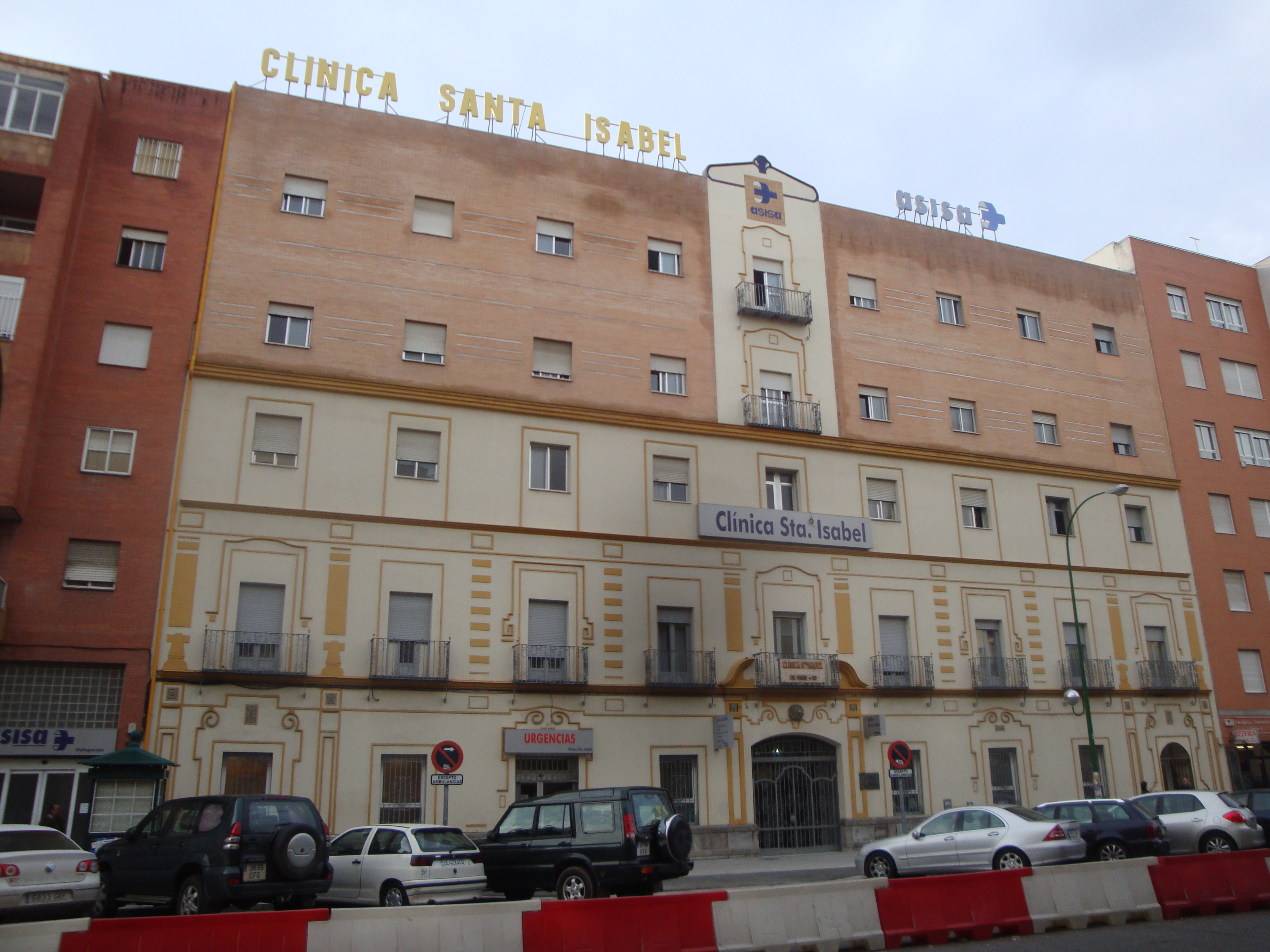 Clínica privada de ASISA en Sevilla